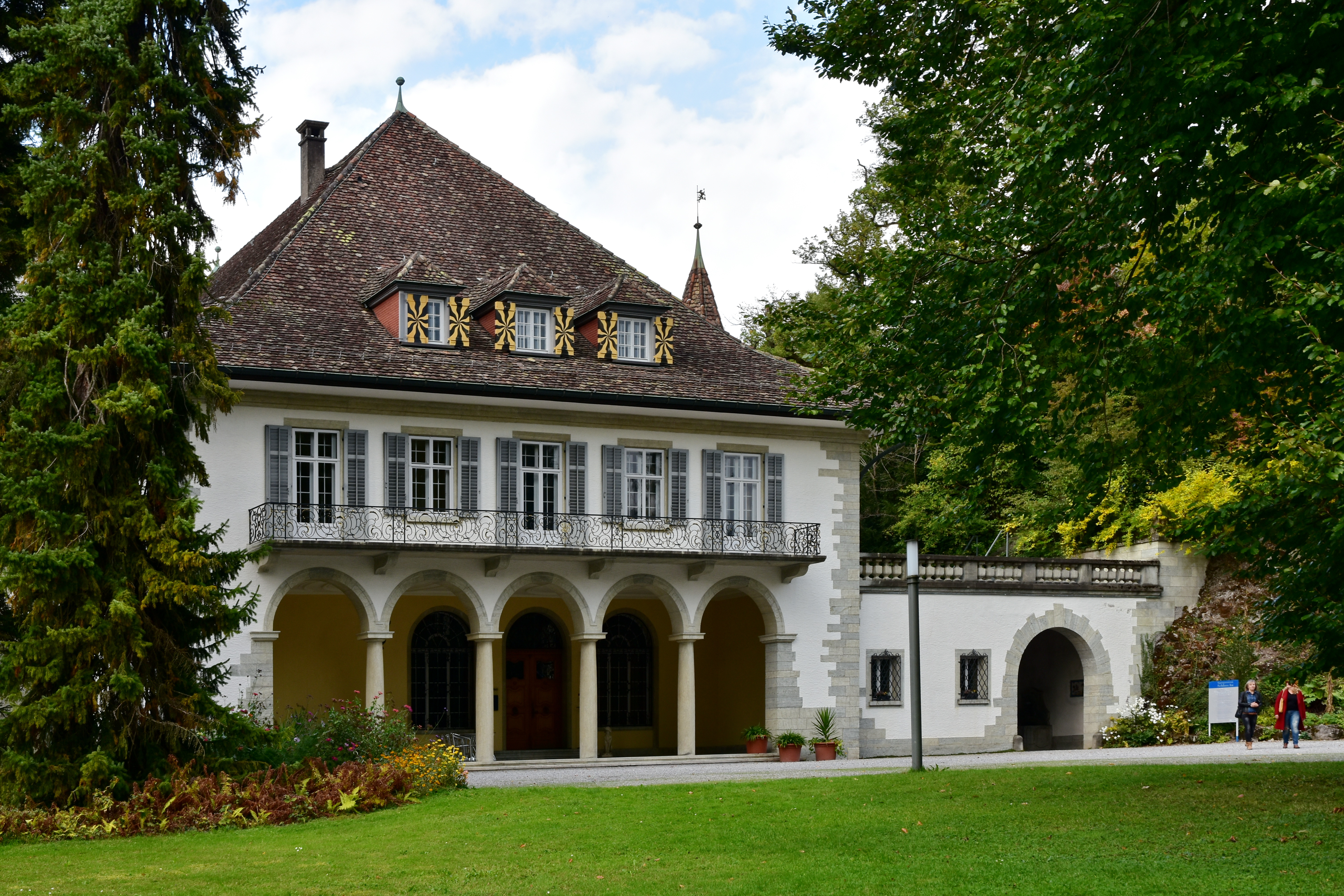 Schloss Au on Au peninsula in Au on Zürichsee in Switzerland